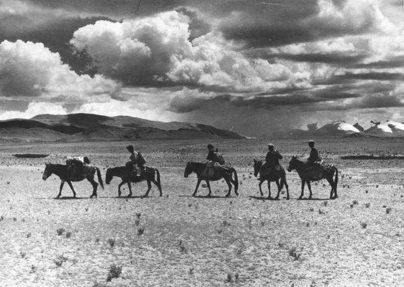 Doptra Steppe zwischen Kampa-Dzong und Doptra